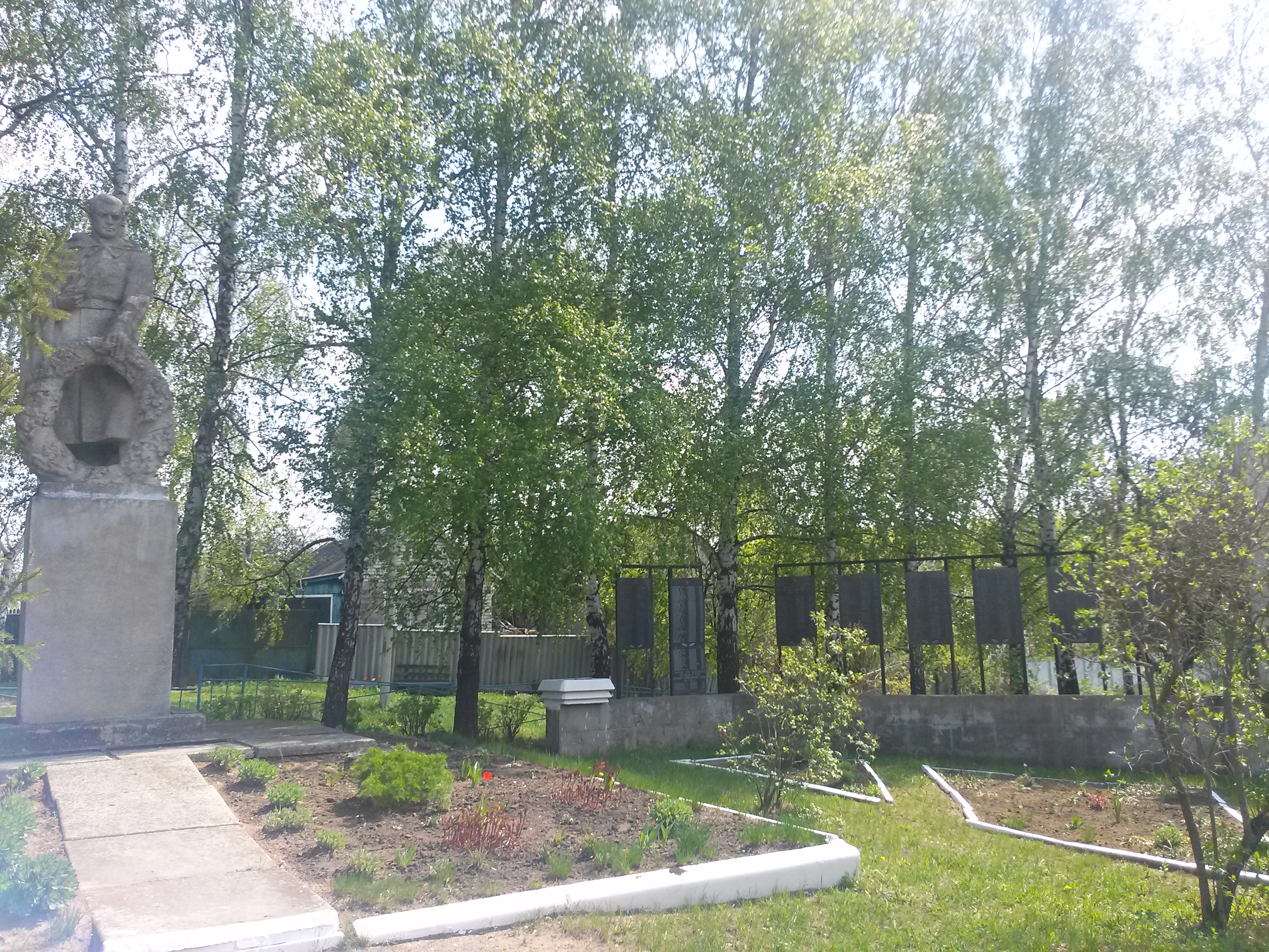 Братська могила та меморіал солдатам Великої Вітчизняної Війни, с. Молодова